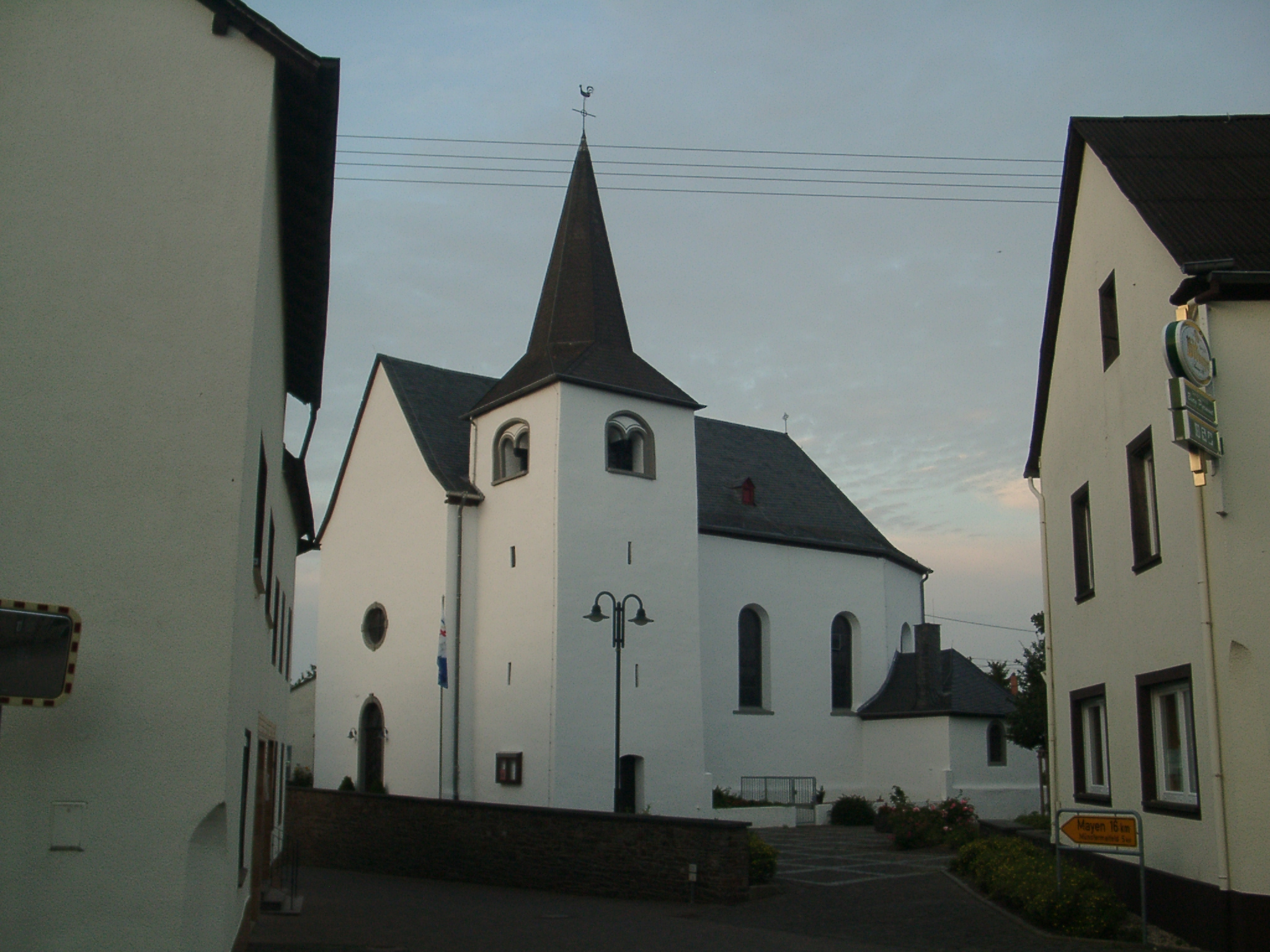 Pillig, Pfarrkirche, Kreis Mayen-Koblenz - selbst fotografiert (Klaus Graf) 23.7.2005